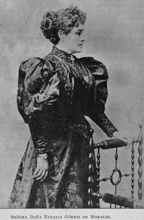 Profesora Natalia Górriz de Morales en 1898.